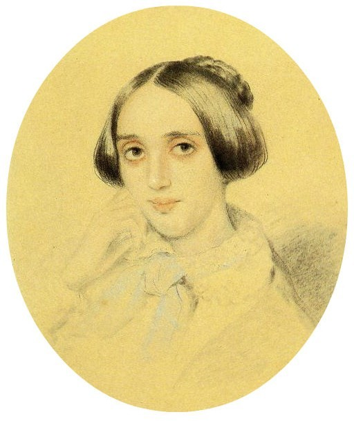 Наталья Валентиновна Шаховская (19.12.1825—1847)